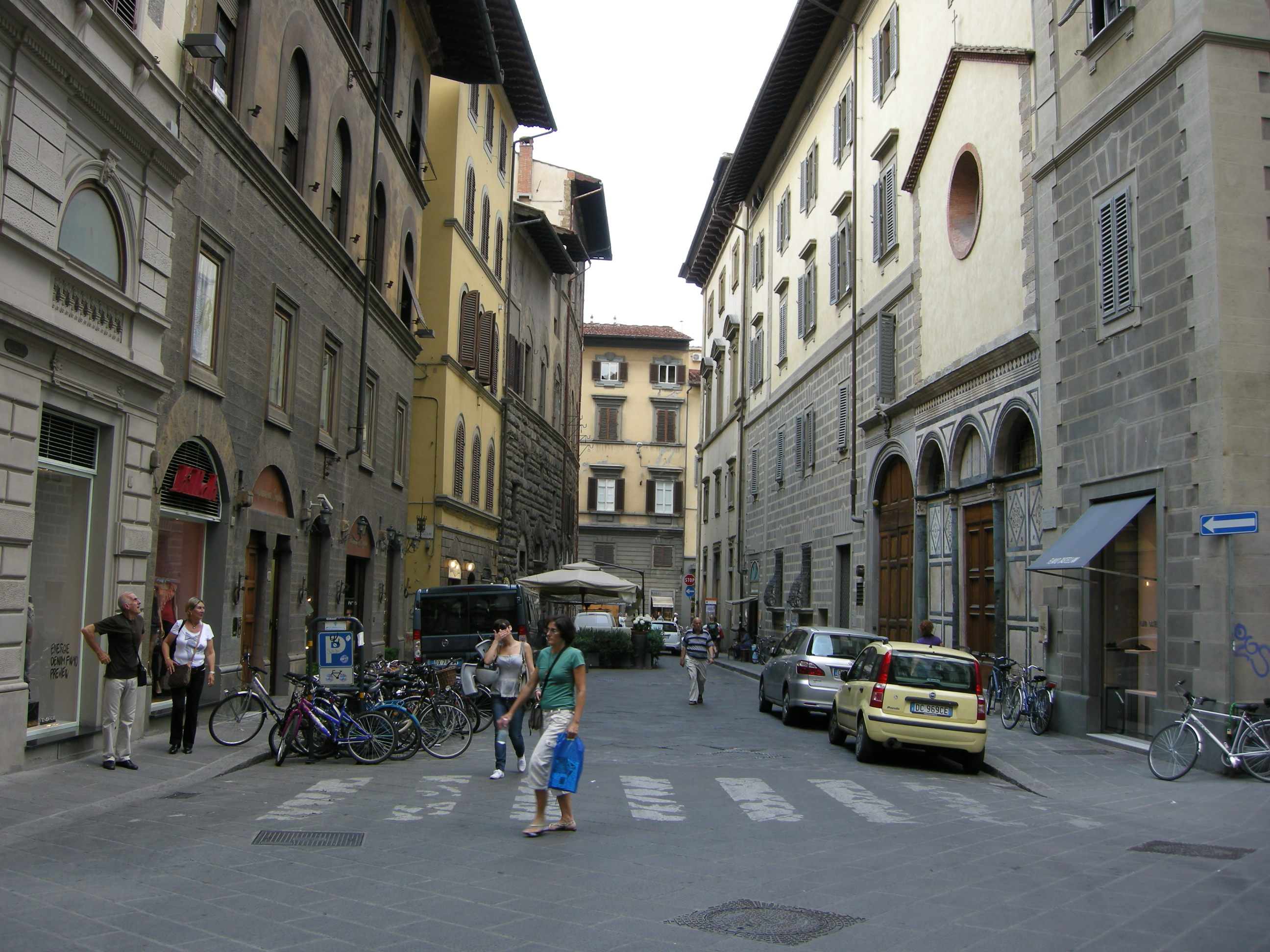 Piazza dell'olio